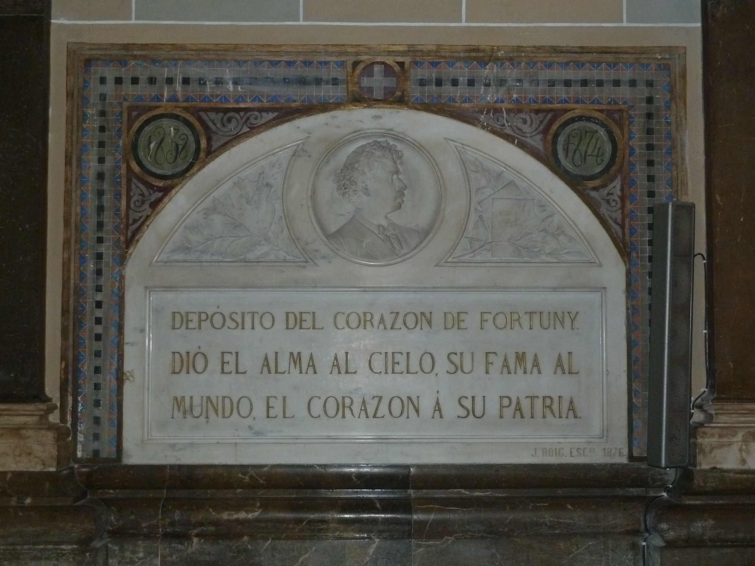 Depósito del corazón de Mariano Fortuny en la iglesia prioral de San Pedro de Reus (Tarragona, España). El epitafio dice "Dio el alma al cielo, su fama al mundo, el corazón a su patria".